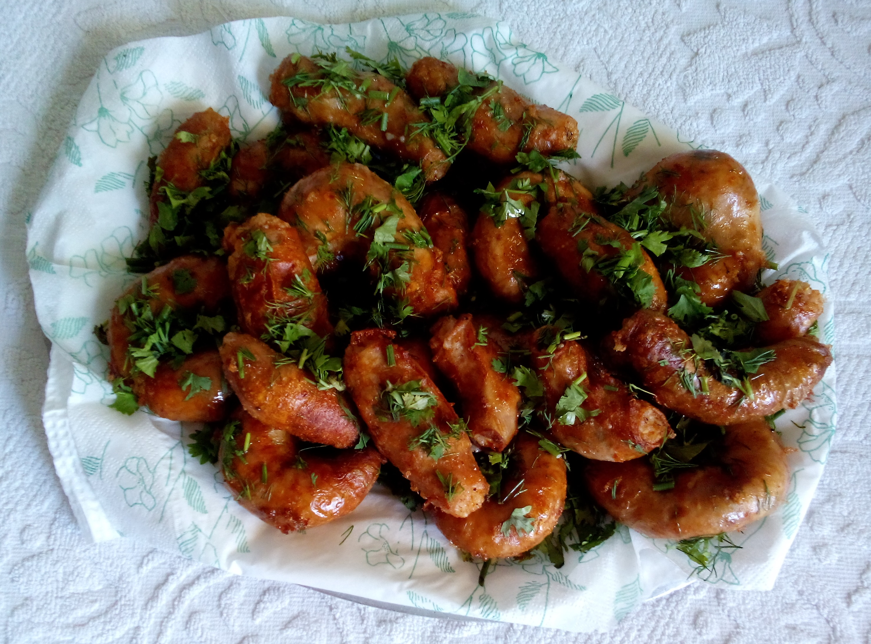 أكلة المومبار المصري، عبارة عن أمعاء الجاموس المحشيّ بالأرز This is an image of food from Egypt